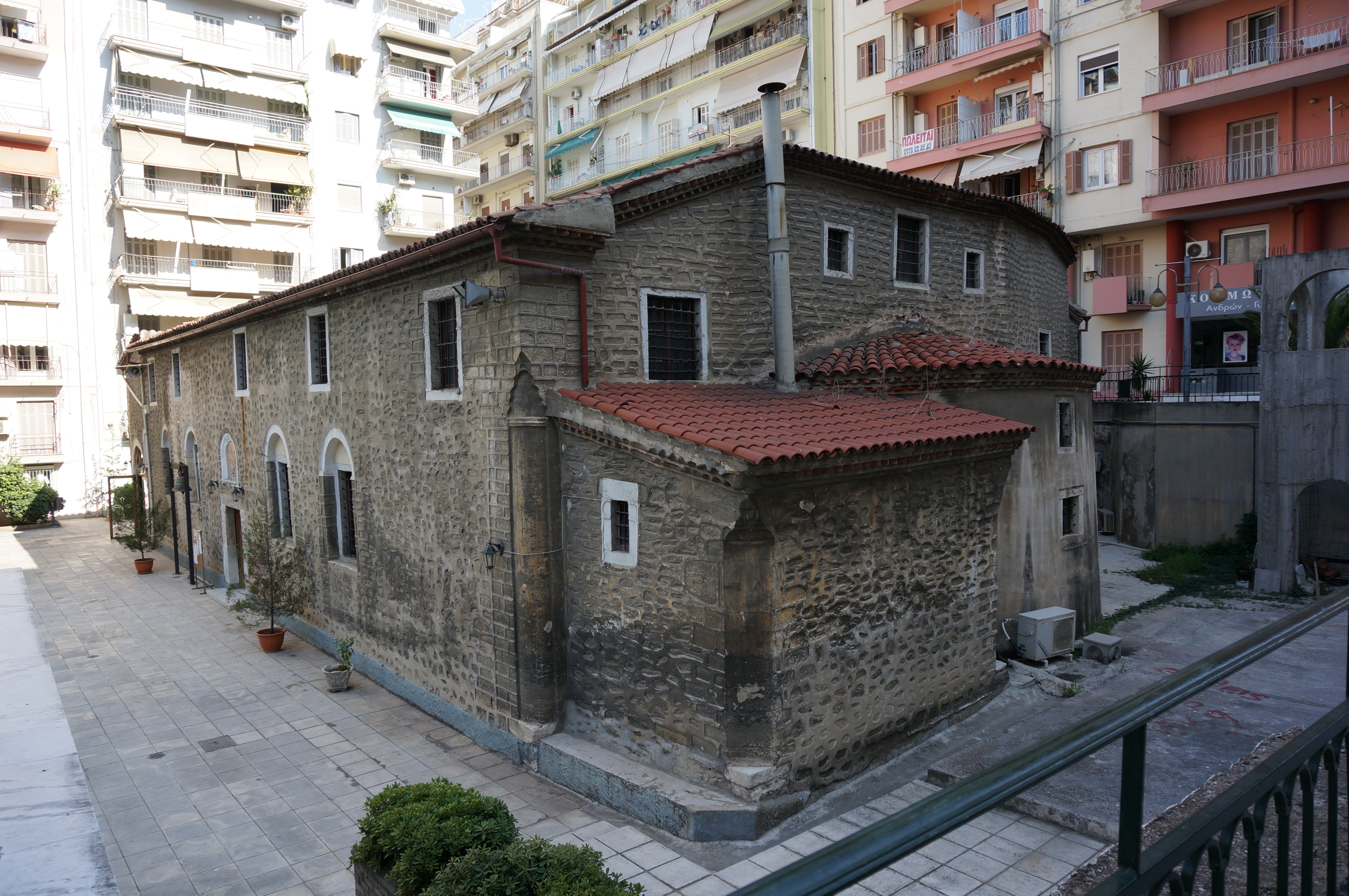 vue de l'église dédiée à Saint Athanase, sur la Via Egniata.